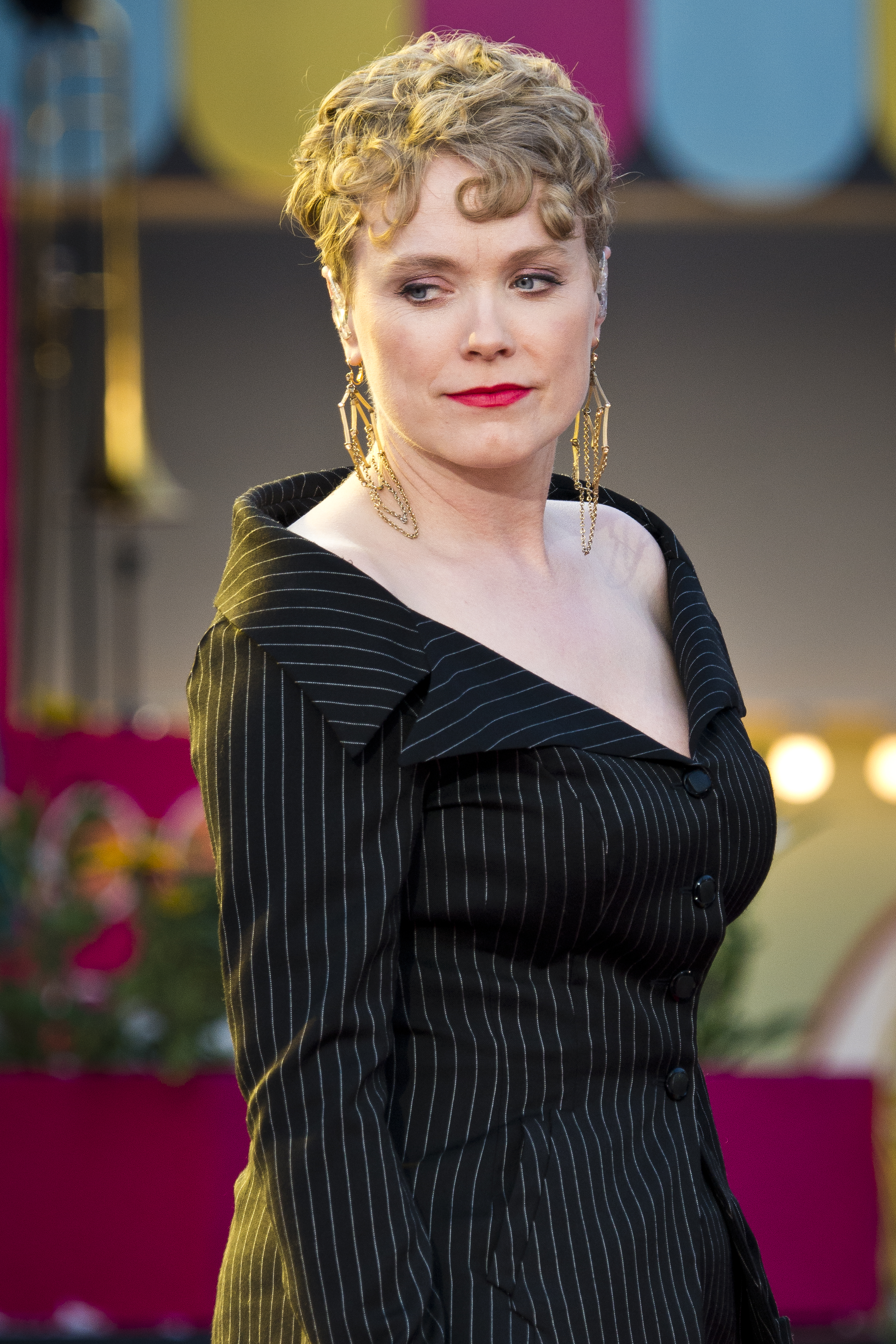 Ane Brun besöker Sommarkrysset i Stockholm, Gröna Lund